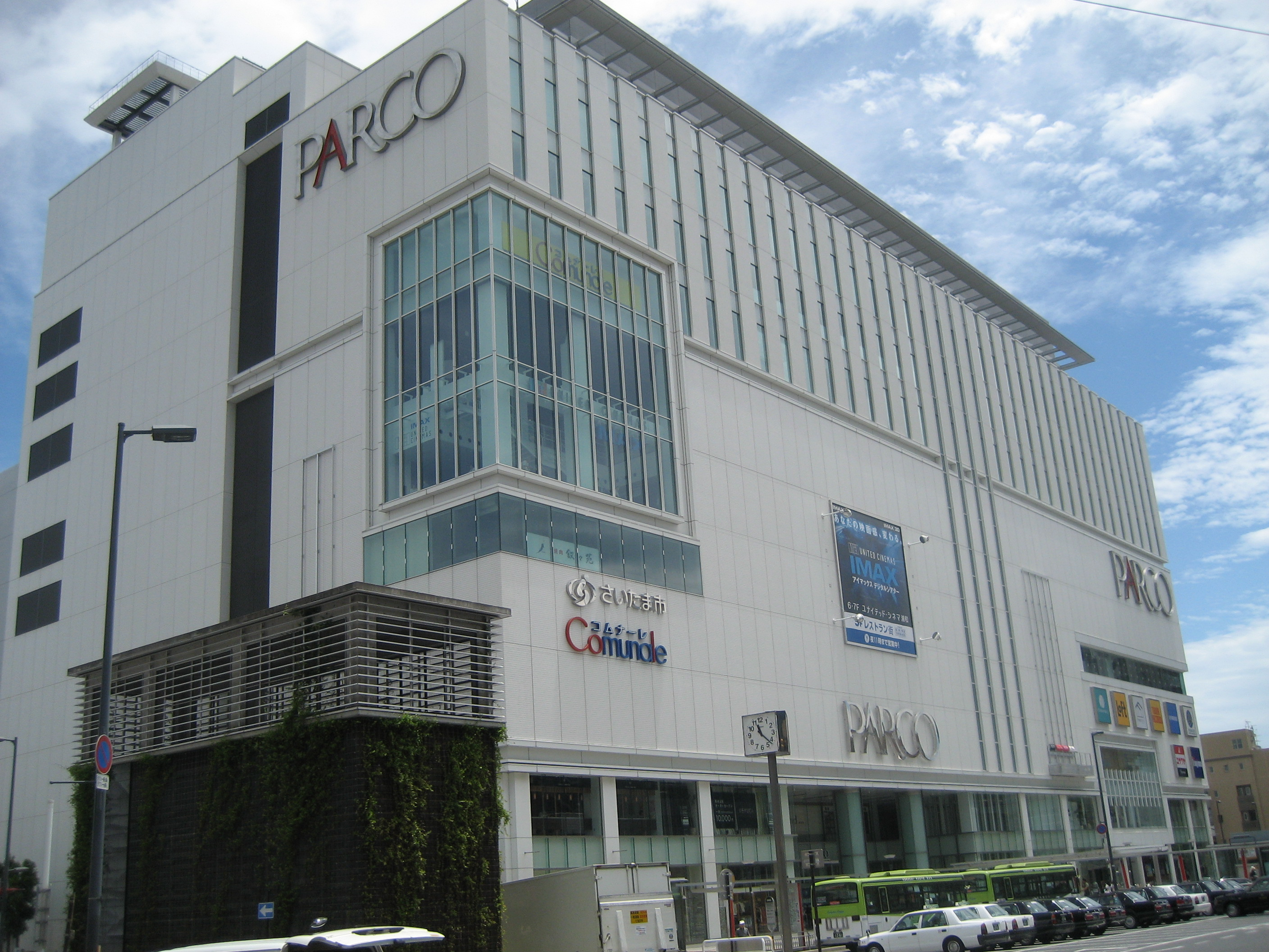 浦和駅東口にあるさいたま市複合公共施設Comunale(コムナーレ)